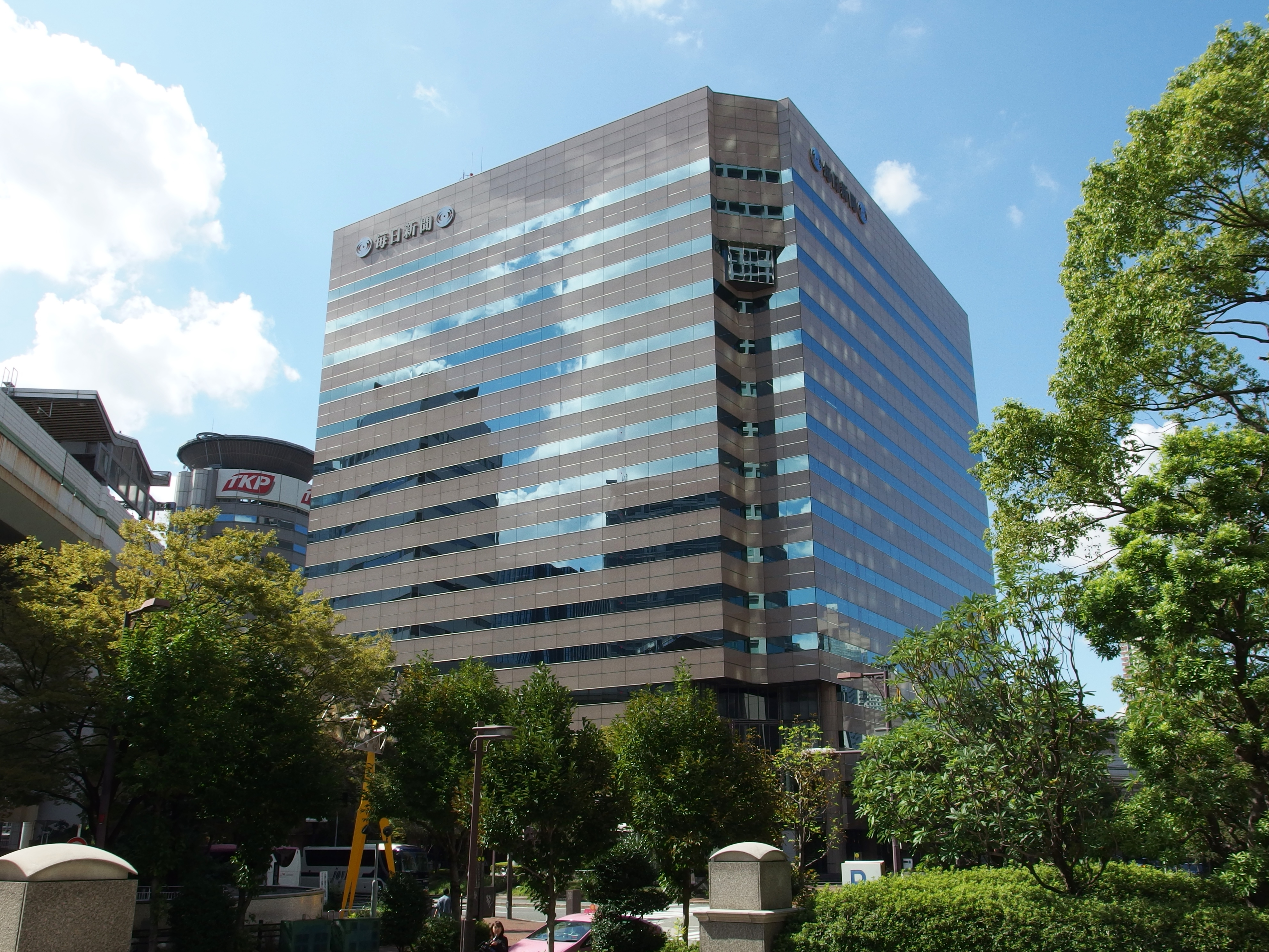 大阪市にある毎日新聞大阪本社が入居する毎日新聞ビル。